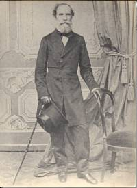 retrato do Conde da Boa Vista (Franscisco do Rego Barros)